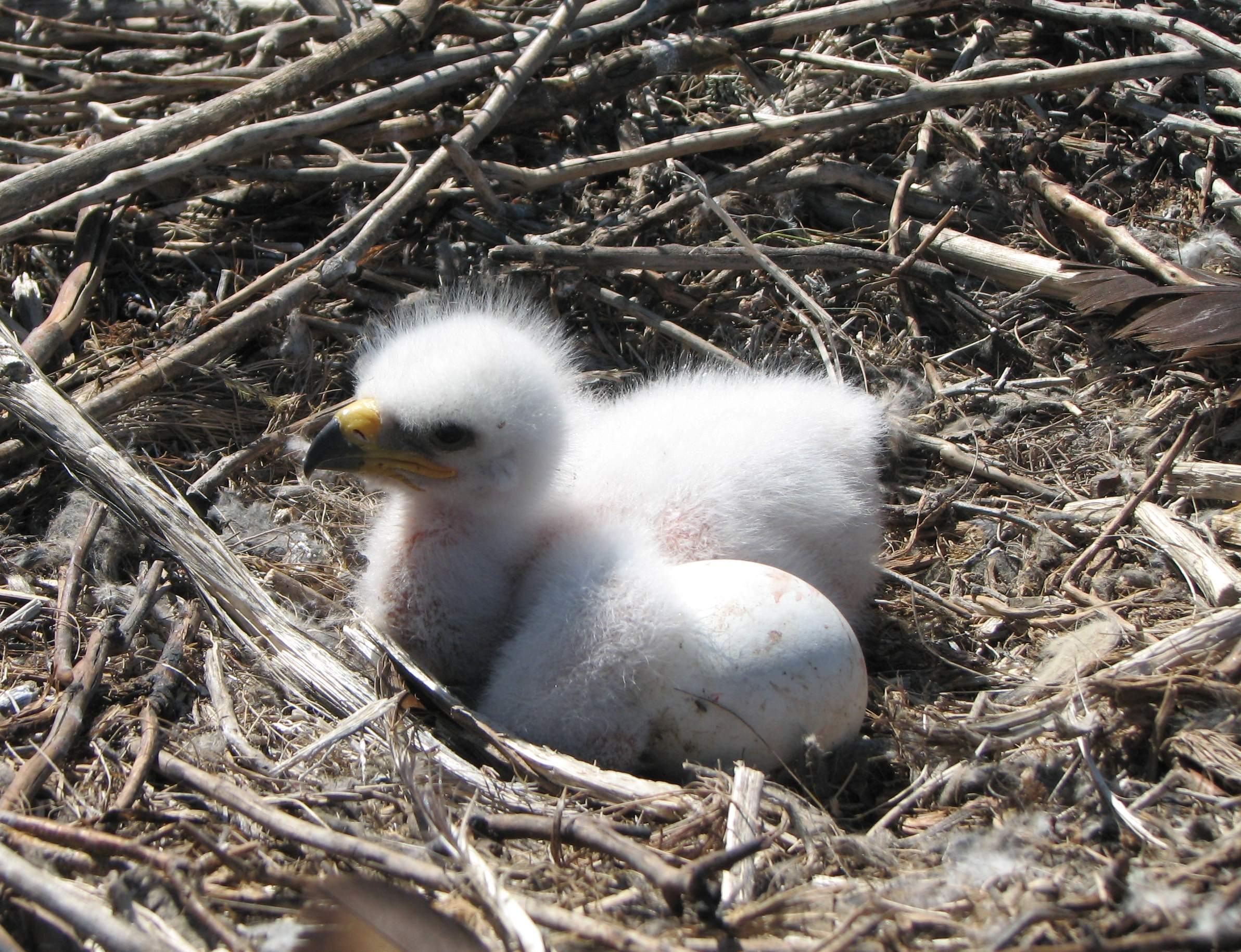 Степной орел (Aquila nipalensis). Пуховой птенец в гнезде. Восточноказахстанский мелкосопочник